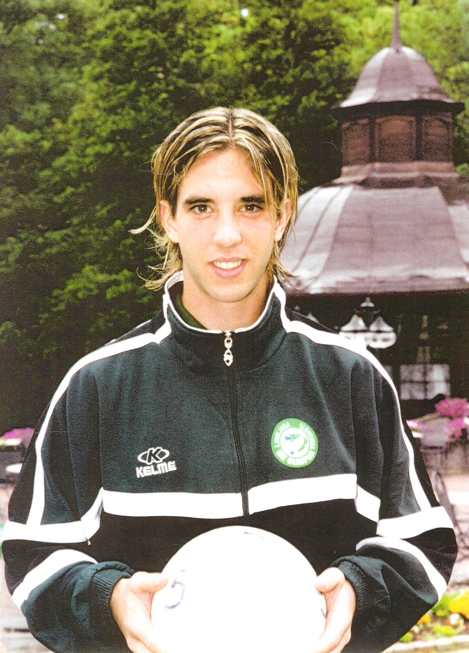 Calleja sign a contract for NK Olimpija Ljubljala